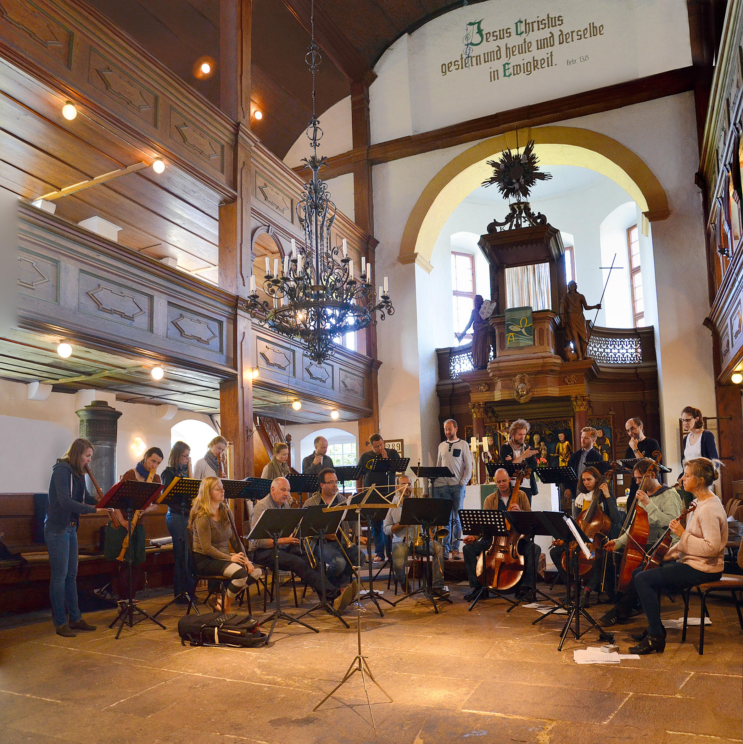 Cantus Thuringia und Capella Thuringia 2016 in Gräfenroda, St. Laurentius Kirche während einer CD-Produktion. Foto: Isabel Noë.